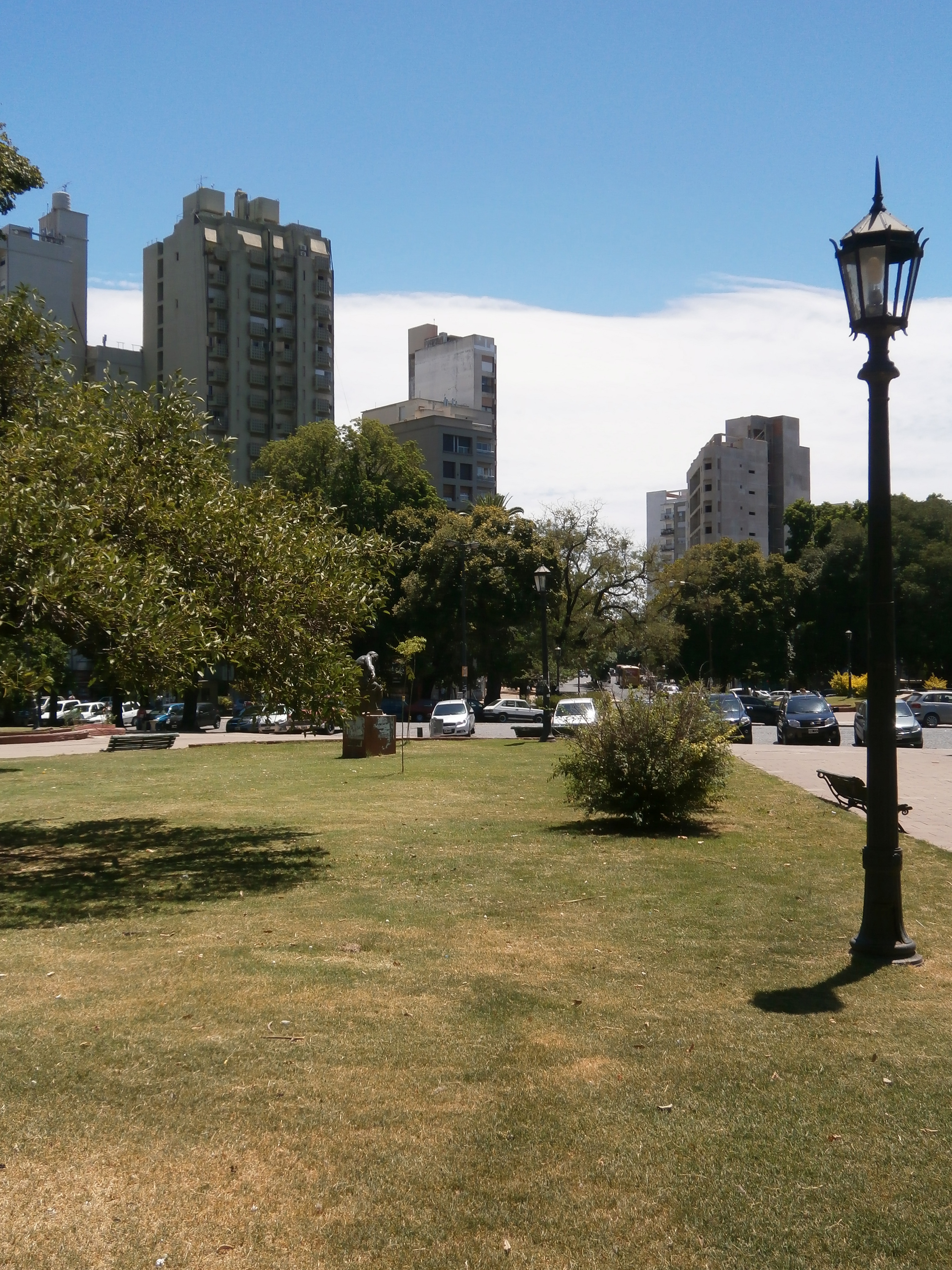 Vista de la Plaza Italia, uno de sus faroles y edificios vecinos, en la ciudad argentina de La Plata.